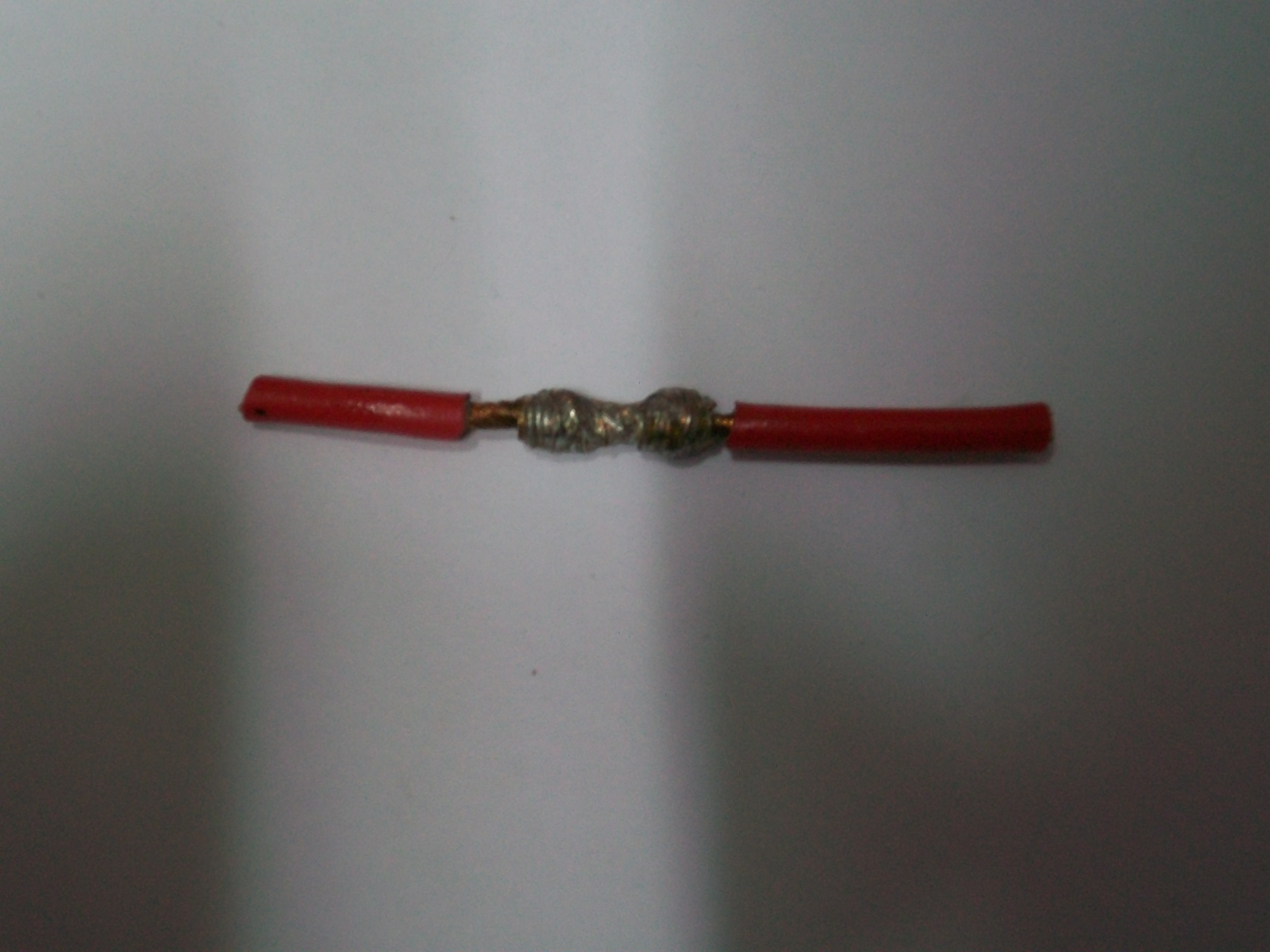 Muestra una fotografia de como quedaria el cable soldado